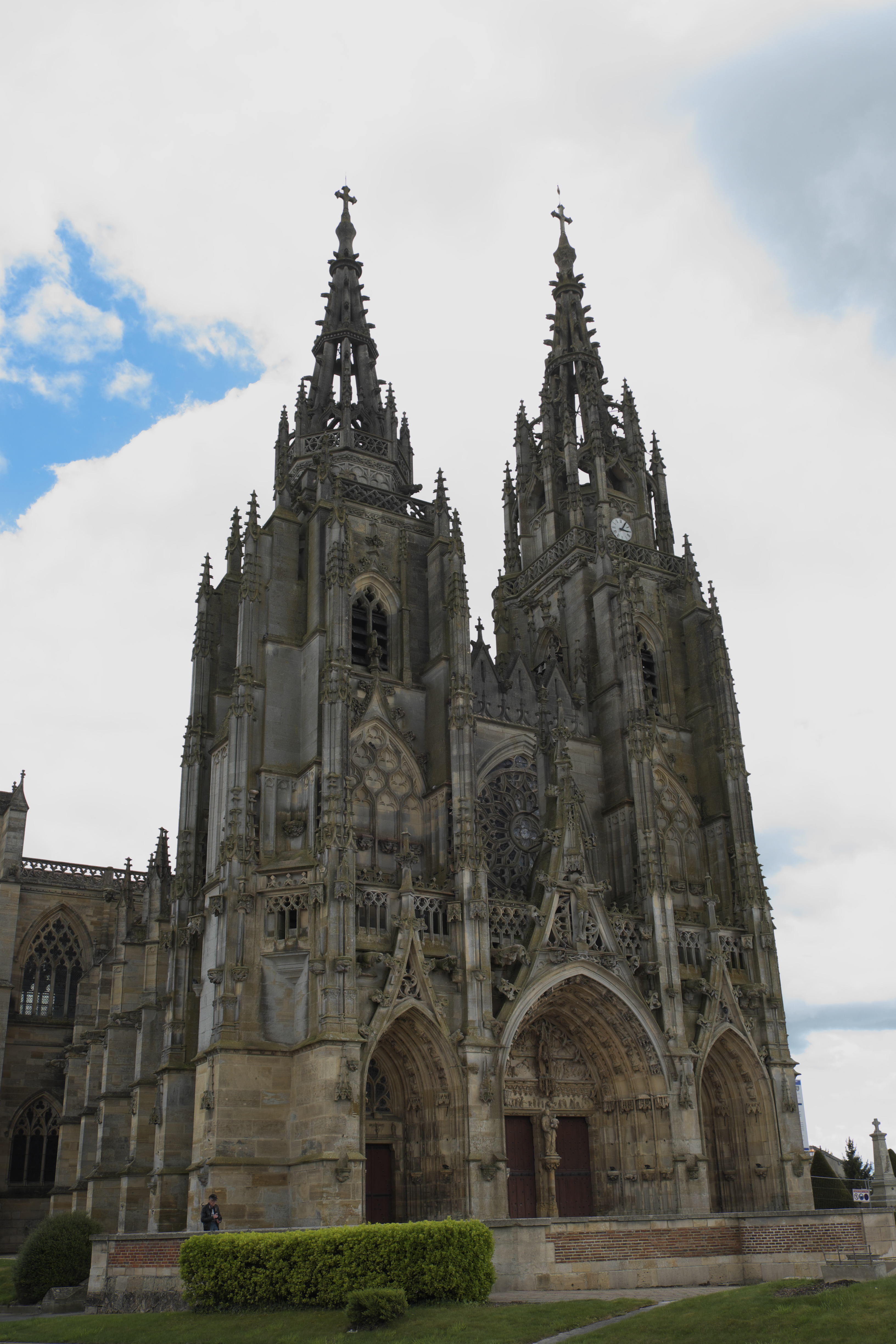 Basilika Notre-Dame in L’Épine (Marne) im Département Marne (Champagne-Ardenne/Frankreich), Westfassade